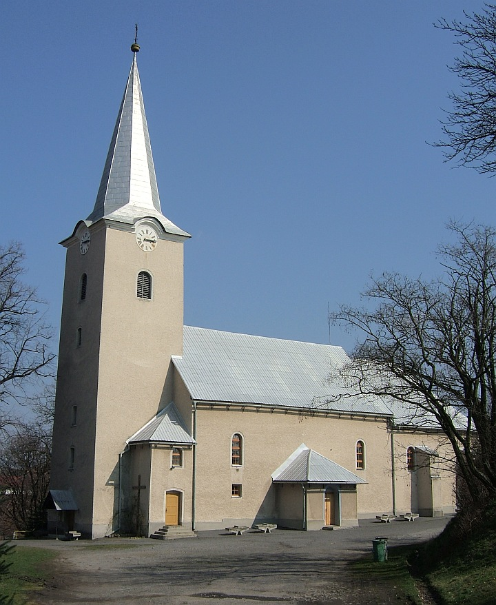 kostol v Bzovíku